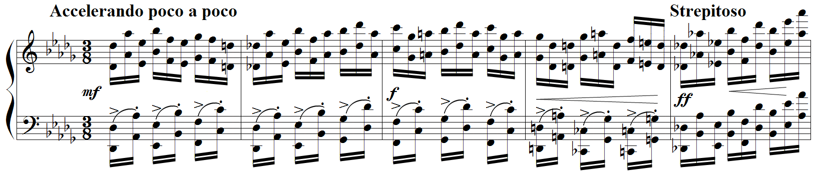 Debussy - Etude "pour les octaves", mes.72-76